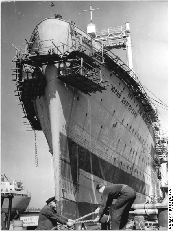 Zentralbild-Mellahn Frö-Noa 29.5.1959 Sowjetischers Walfangmutterschiff wird gebaut. 60 Wale können täglich auf dem über 20.000 Tonnen großen sowjetischen Walfangmutterschiff "Jury Dolgoruky" verarbeitet werden, daß gegenwärtig in der Warnemünder Warnowwerft ausgebaut wird. Schon 1960 kann das Schiff Kurs auf die Walfanggründe nehmen. Beim Ausbau dieses Schiffes hat sich zum ersten Mal in der volkseigenen Schiffsbauindustrie der DDR die Gemeinschaftsarbeit aller DDR-Hochseewerften durch die Entsendung zahlreicher sozialistischer Arbeitskollektive bewährt. Nach diesem Prinzip unterstützen nunmehr die Warnemünder, Rostocker und Wismarer Werftarbeiter ihre Kollegen in der Stralsunder Volkswerft, die darum kämpfen, in diesem Jahr 15 Fischerei-Fahrzeuge über den Plan auszuliefern. UBz: Die "Jury Dolgoruky" am Ausrüstungskai."